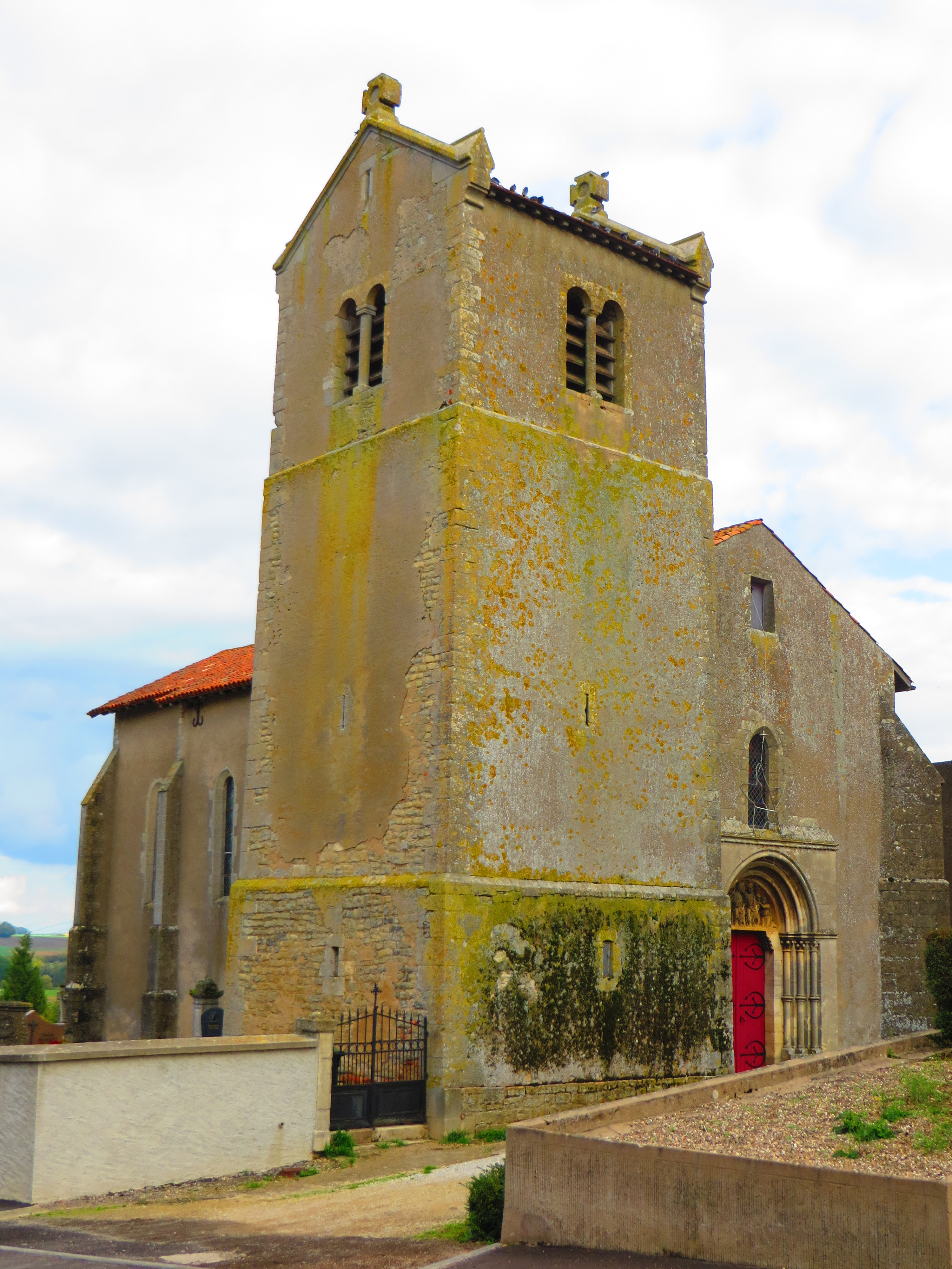 Lemoncourt Église de la Nativité-de-la-Bienheureuse-Vierge-Marie